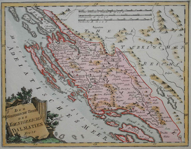 Der Noerdliche Theil des Koenigreichs Dalmatien. Nro. 24. Kolorierter Kupferstich